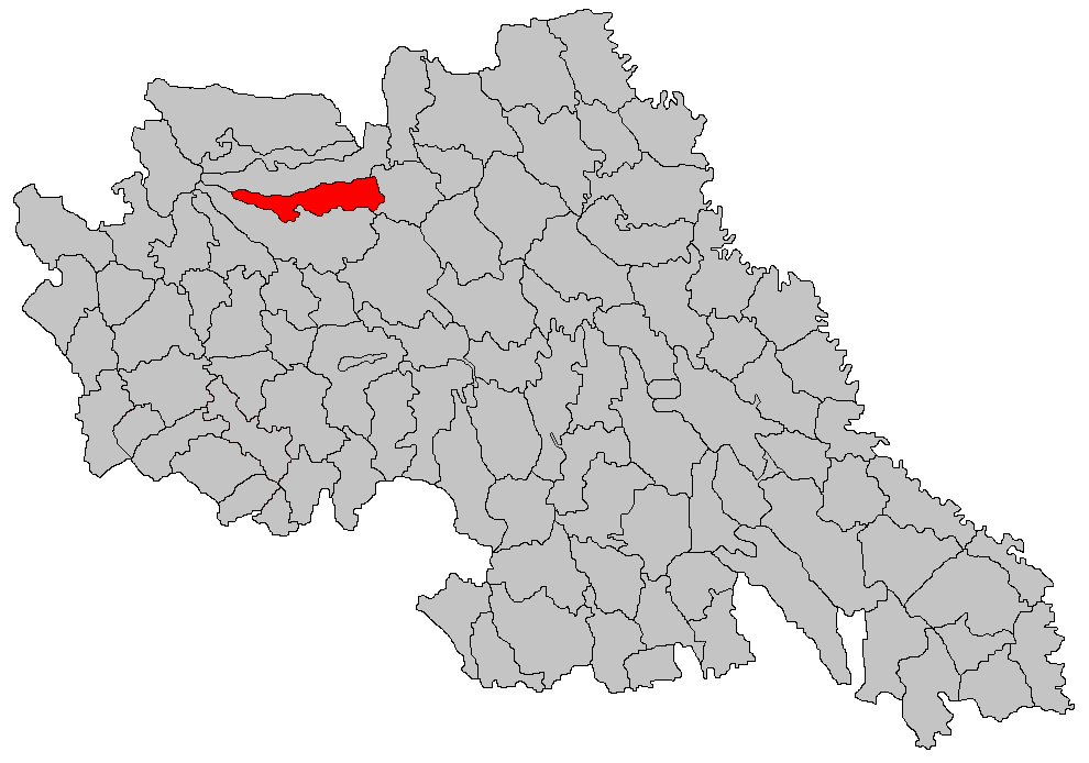 Categorie:Hărţi ale judeţului Iaşi